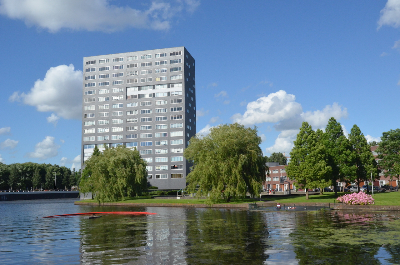 Woongebouw 'Finisterre'. Foto: Erik Swierstra.